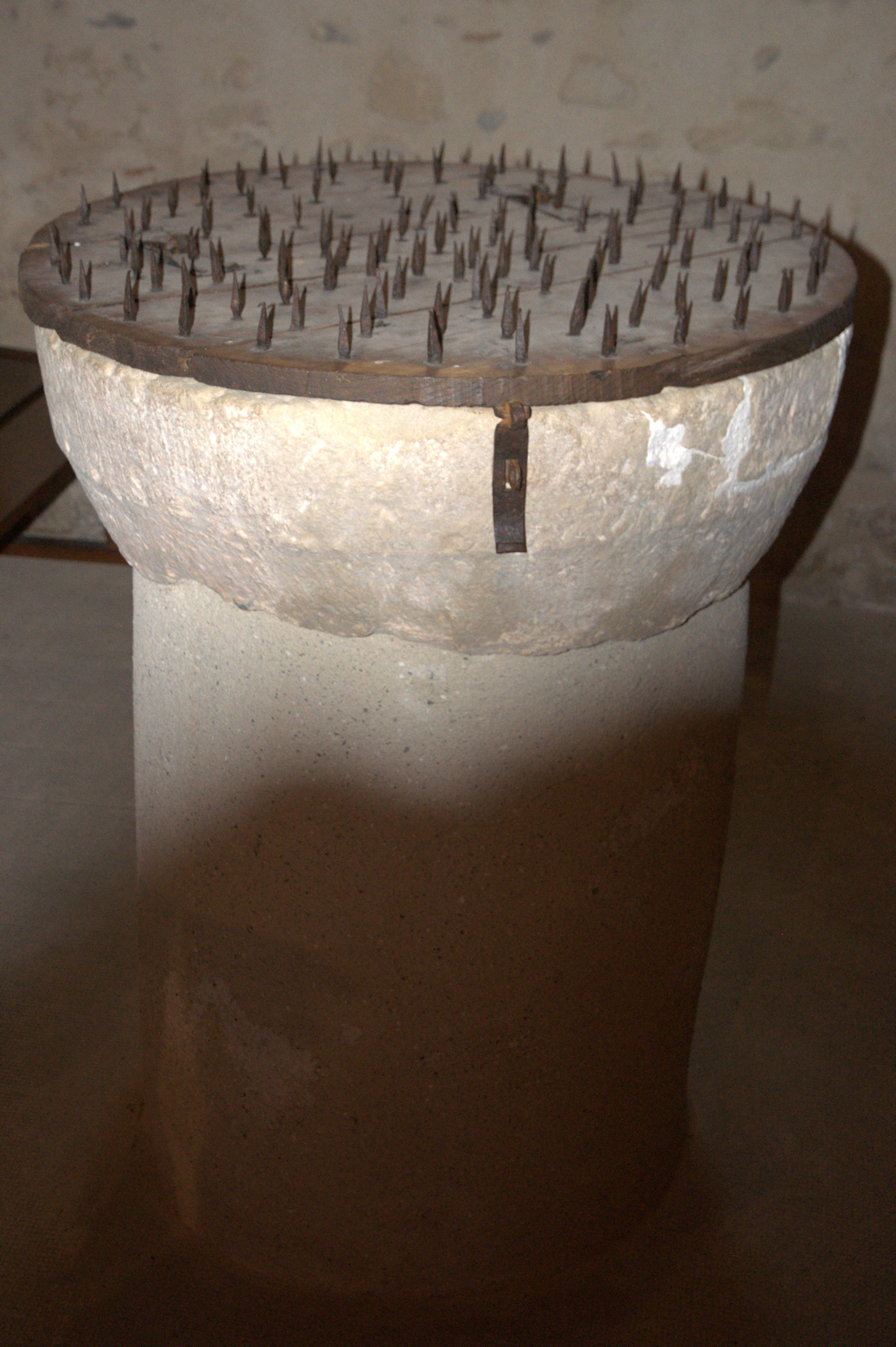 Fonts Baptismaux. Église de Mascaraas (Béarn) - France .